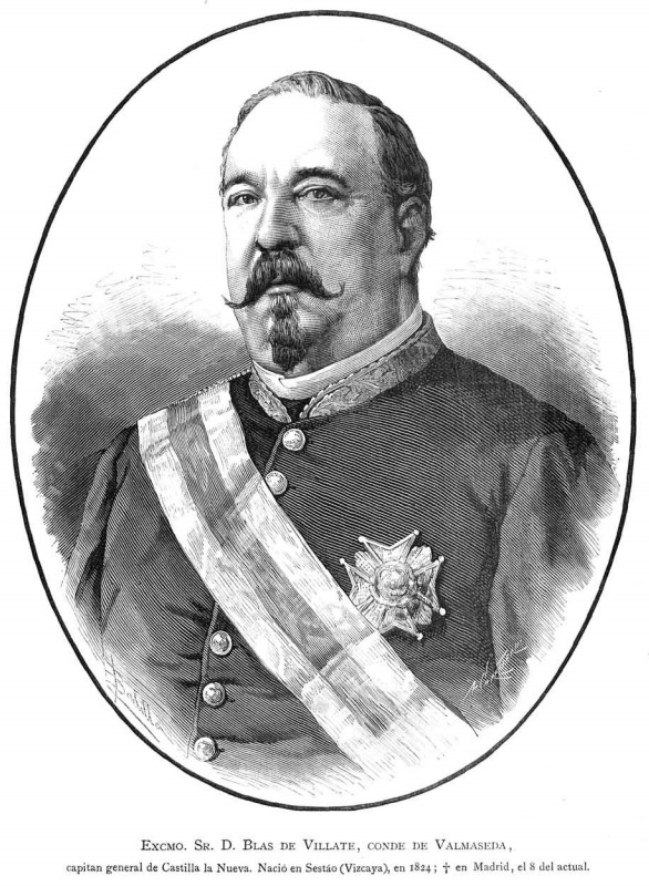 Blas de Villate, conde de Valmaseda